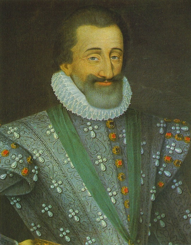 Henri IV de France, Henry IV of France